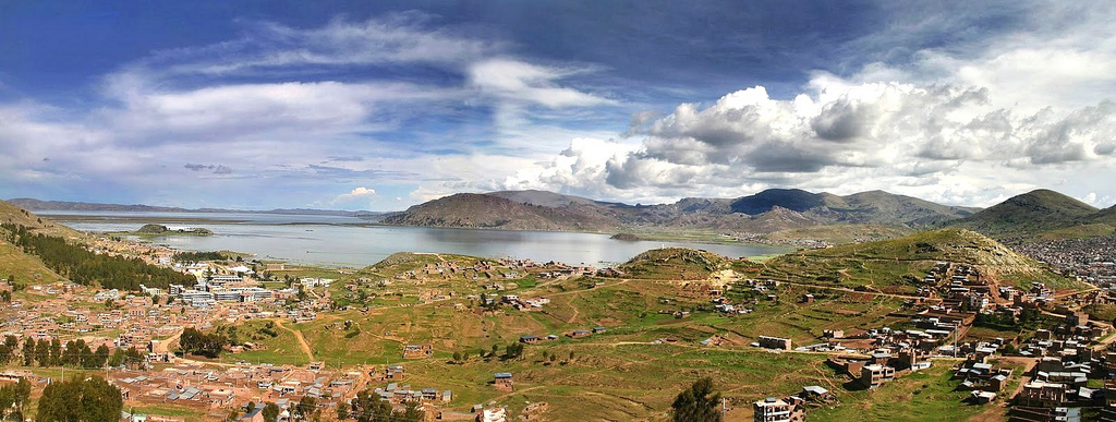 Panoramica de la ciudad de PUNO